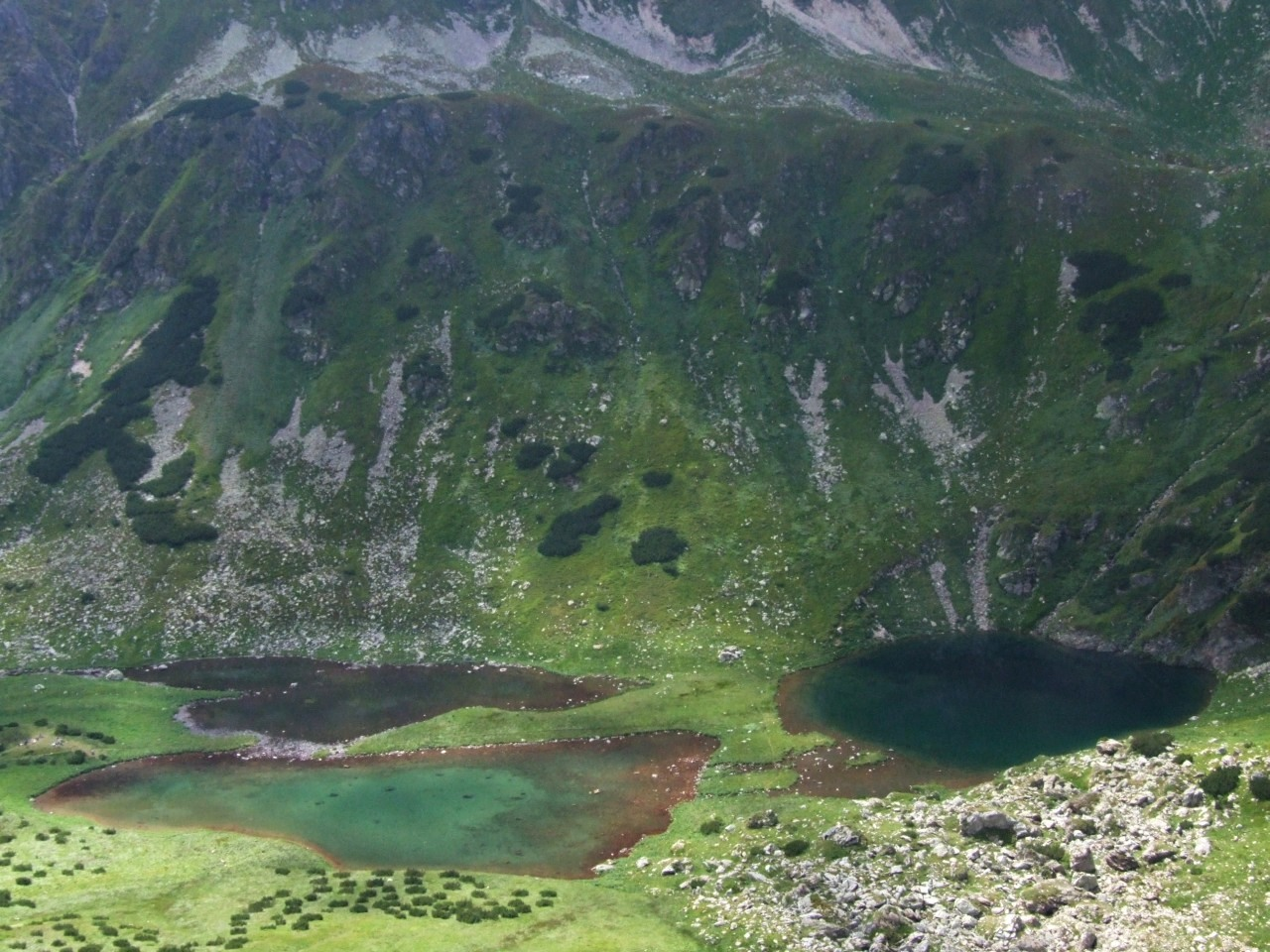 Raczkowe Stawy